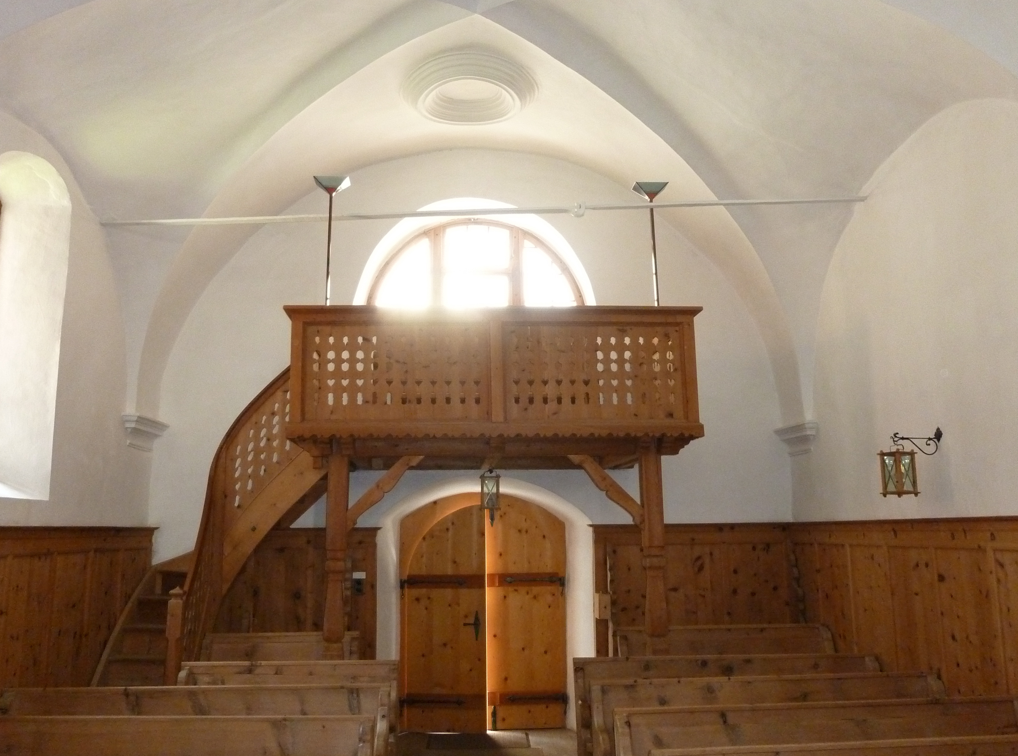 Reformierte Kirche Latsch GR: Empore